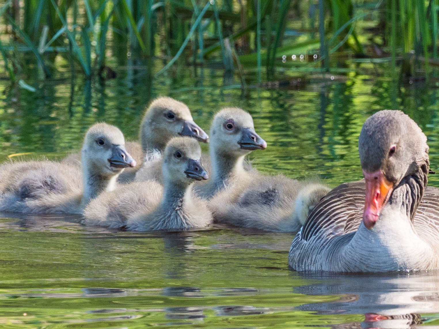 Anser anser